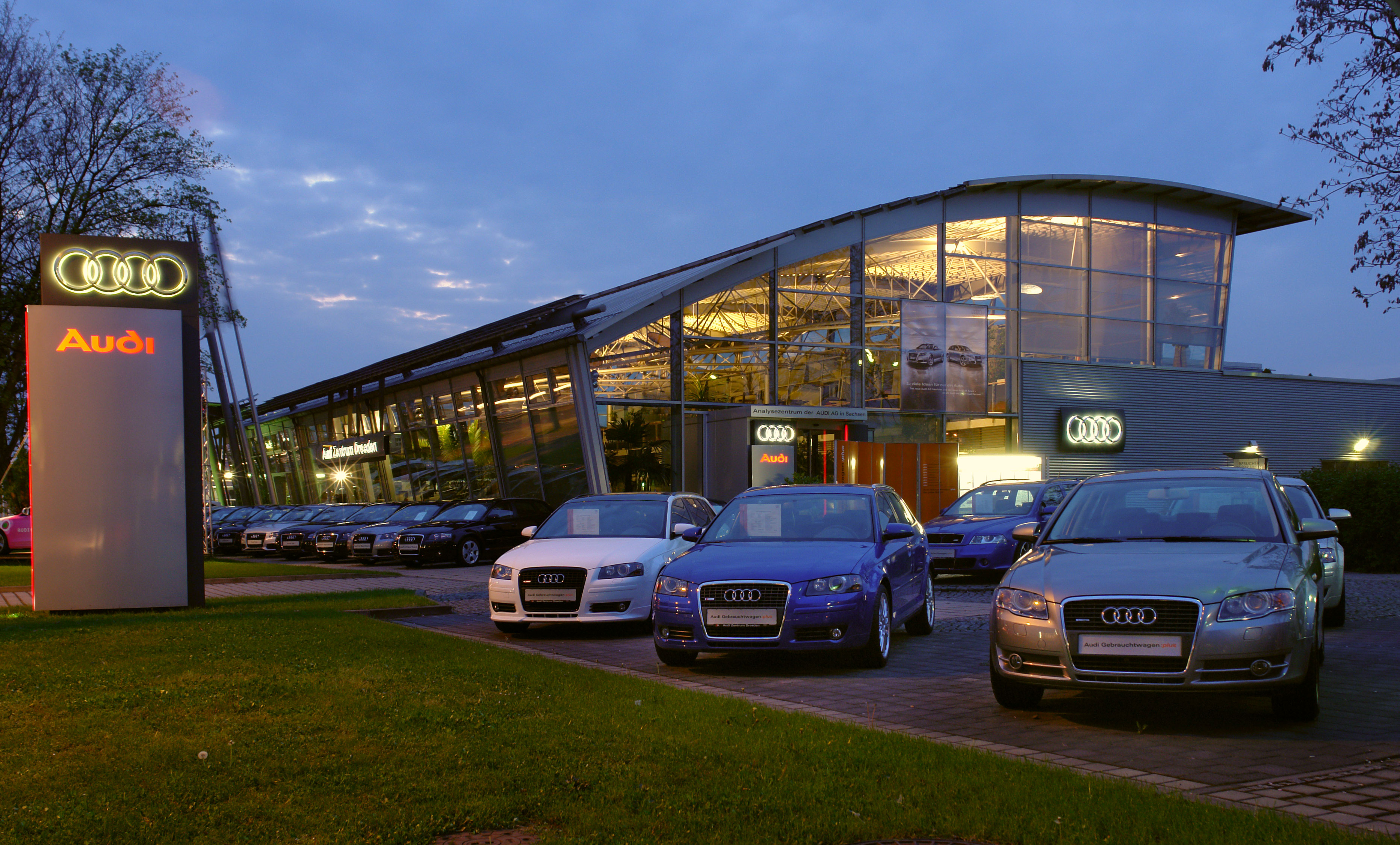 Audi Autohaus in Dresden